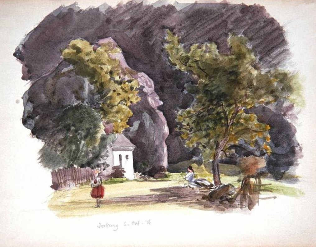 Seeburg um 1870 - Zeichnung von Eduard von Kallee Seeburger Tal mit Haus u. 2 Frauen. Lavierte Zeichnung von Eduard von Kallee um 1870